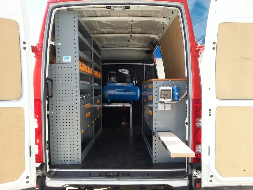 Inansur dicese la empresa de equipamientos de furgonetas que se dedica a la transformación de vehiculos en furgonetas taller